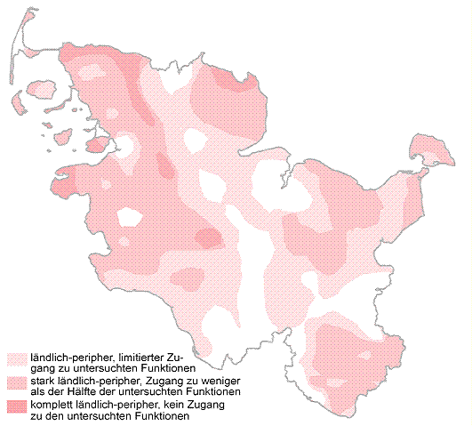 ländliche Räume in Schleswig-Holstein nach qualitativen Kriterien ermittelt.